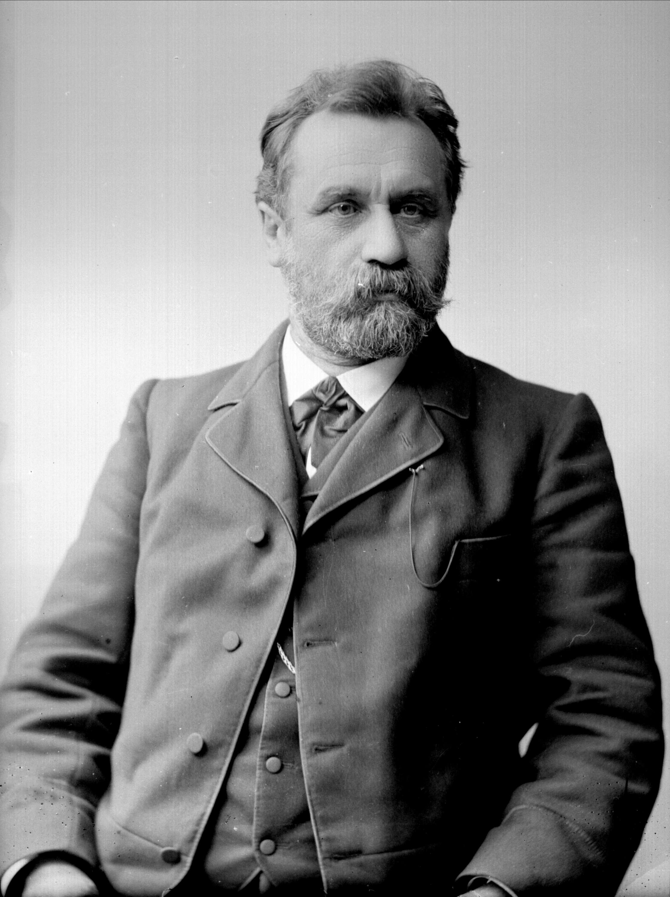 Bernhard Cathrinus Pauss fotografert av Gustav Borgen. Trolig ca. 1890–1895.